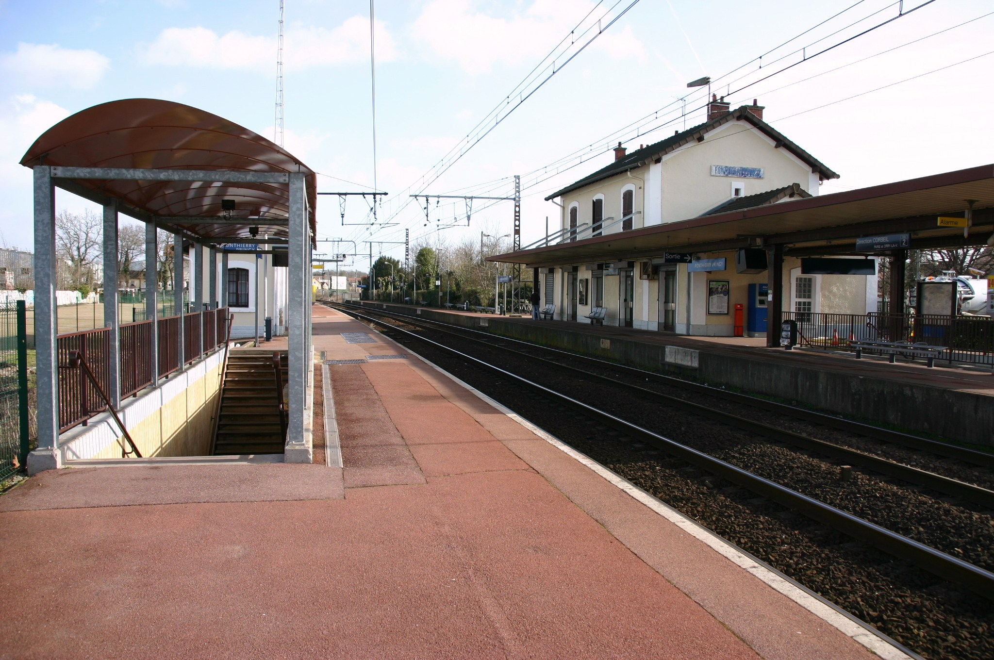 La gare de Ponthierry - Pringy, Saint-Fargeau-Ponthierry, département de la Seine-et-Marne (France)